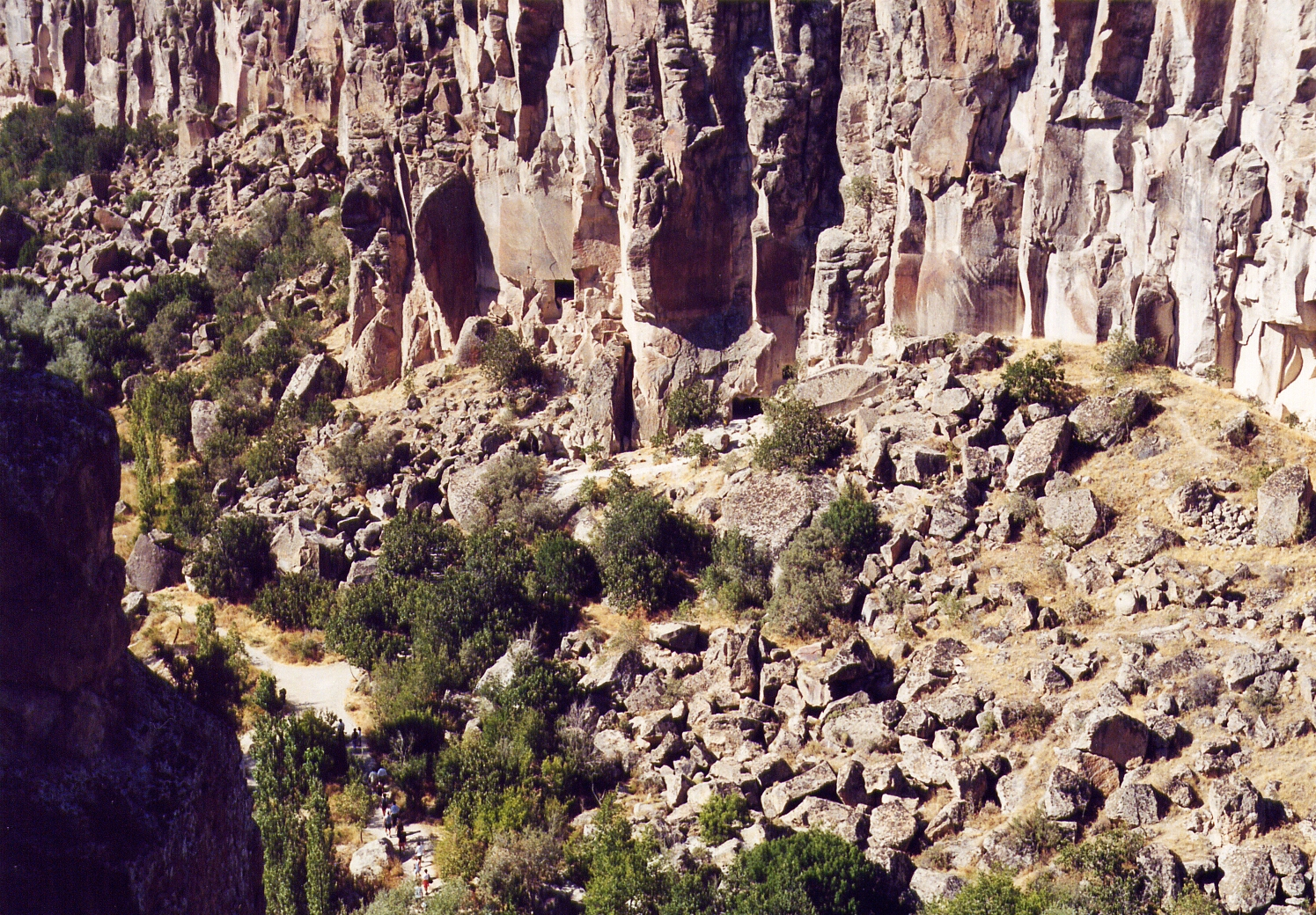 Ihlara-Schlucht von der Einstiegstreppe aus, Kappadokien, Zentraltürkei